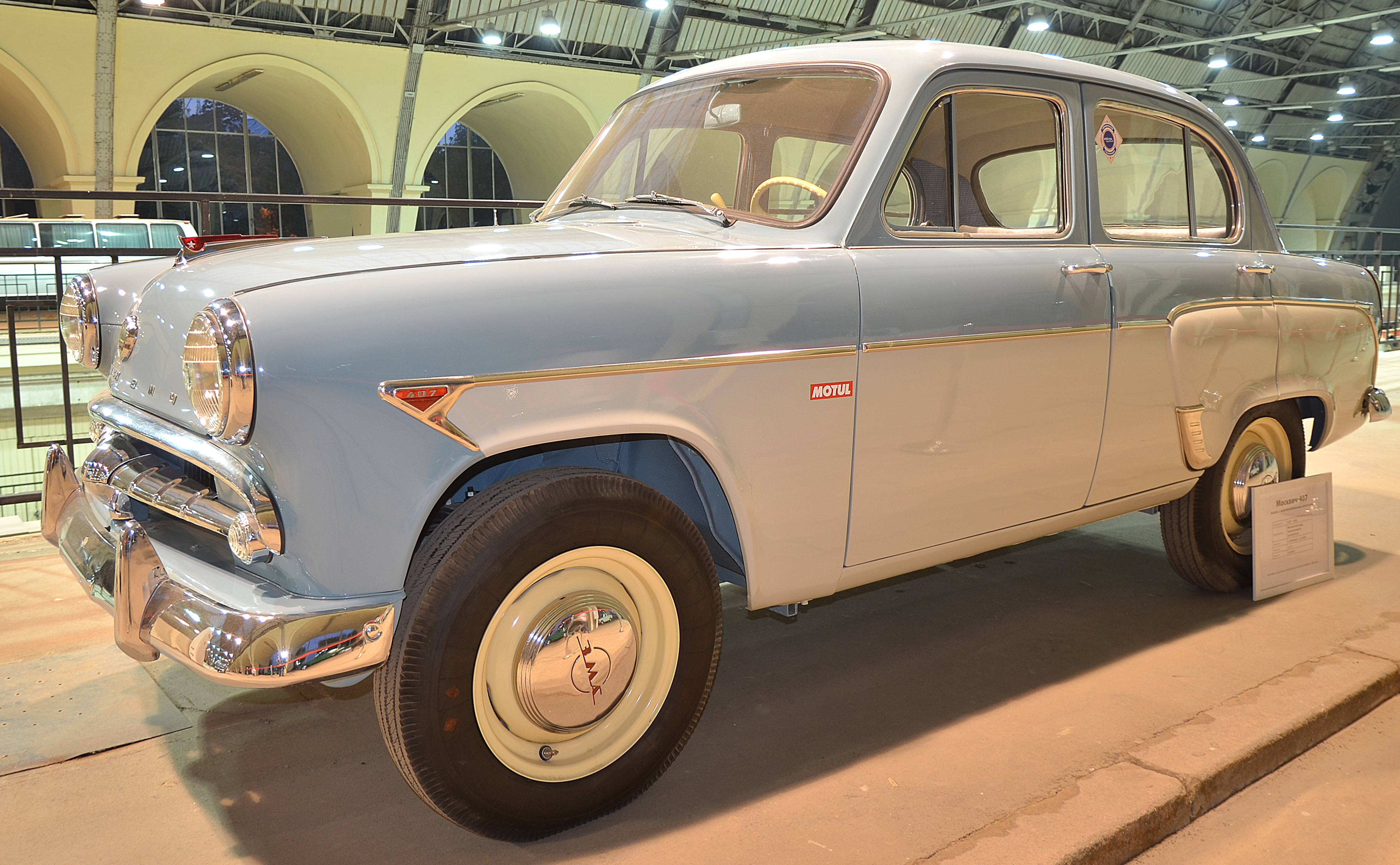 Можно увидеть здесь : You can see here